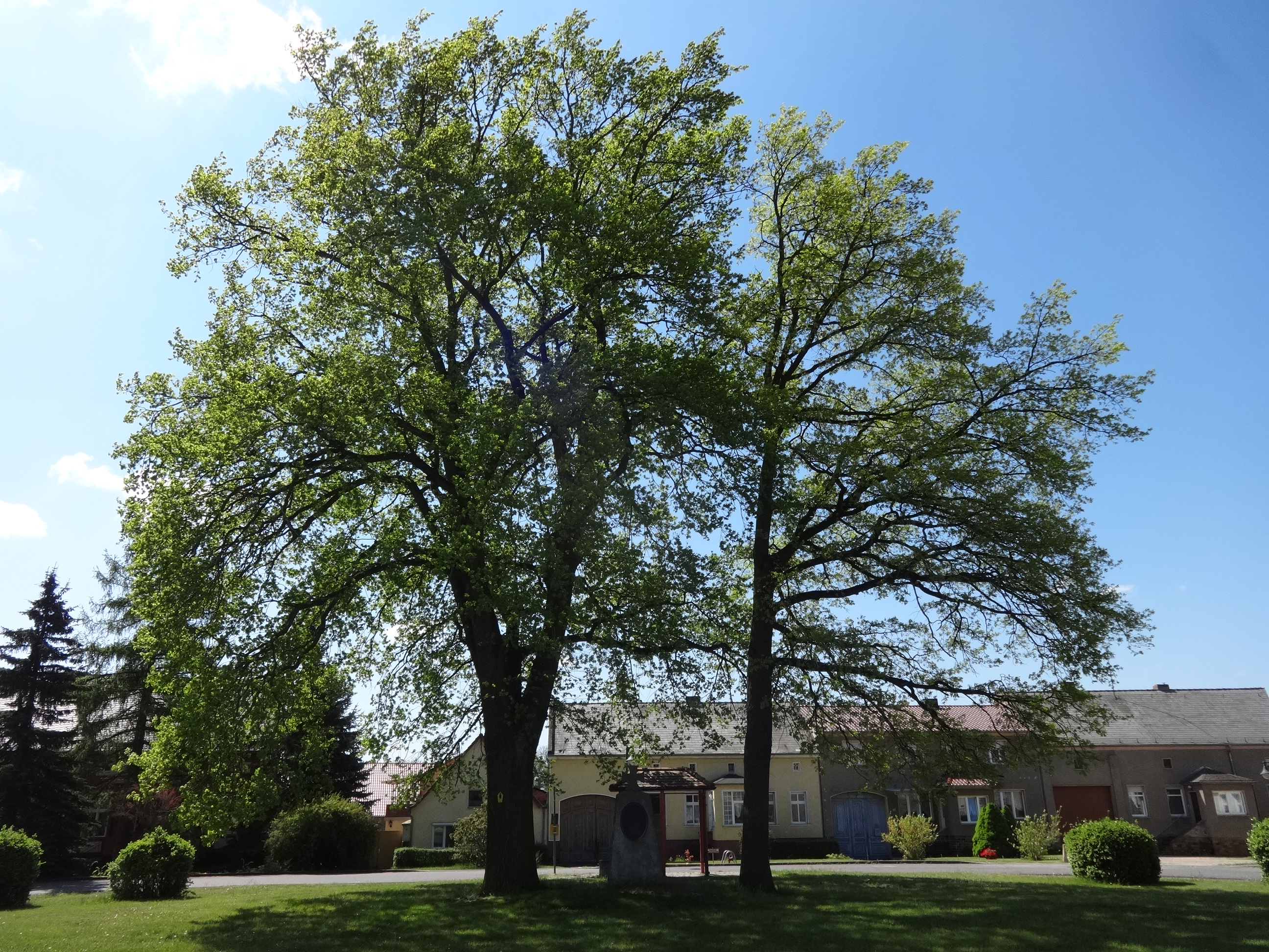 Denkmal für die Gefallenen der Weltkriege in Glau, Trebbin, Brandenburg